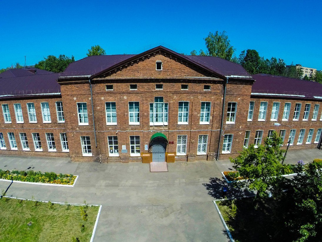 Главный вход в школу №1 Можайска